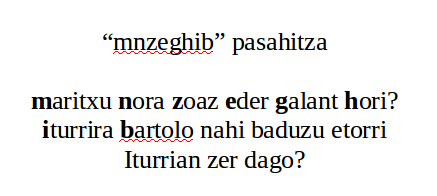 Nola sortu pasahitz bat abesti batekin